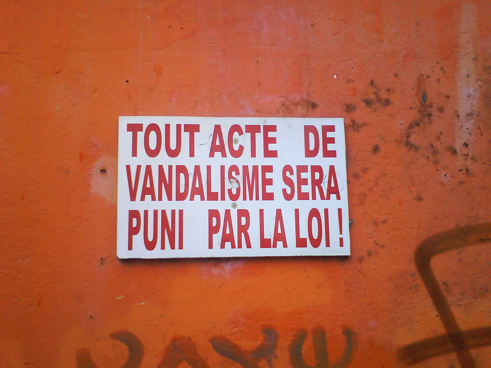 panneau d'interdiction de vandalisme, à Mons, Belgique